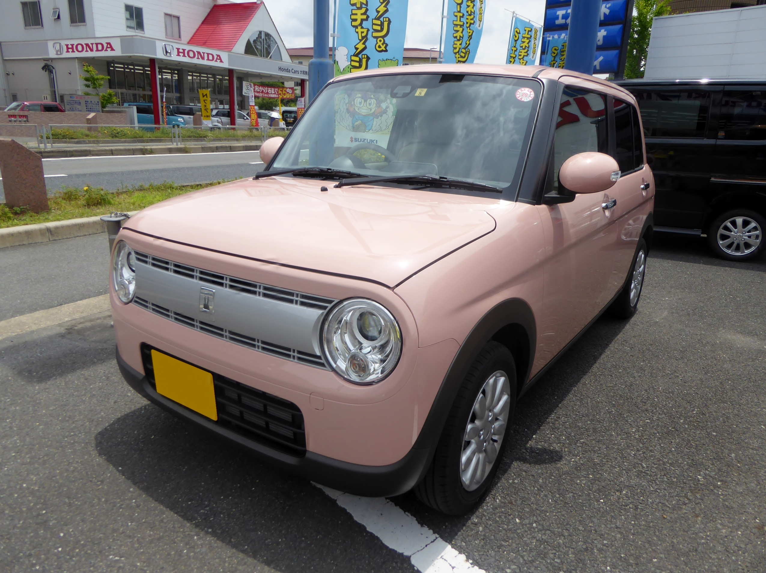 HE33S型スズキ・アルトラパンXをフロントから撮影。